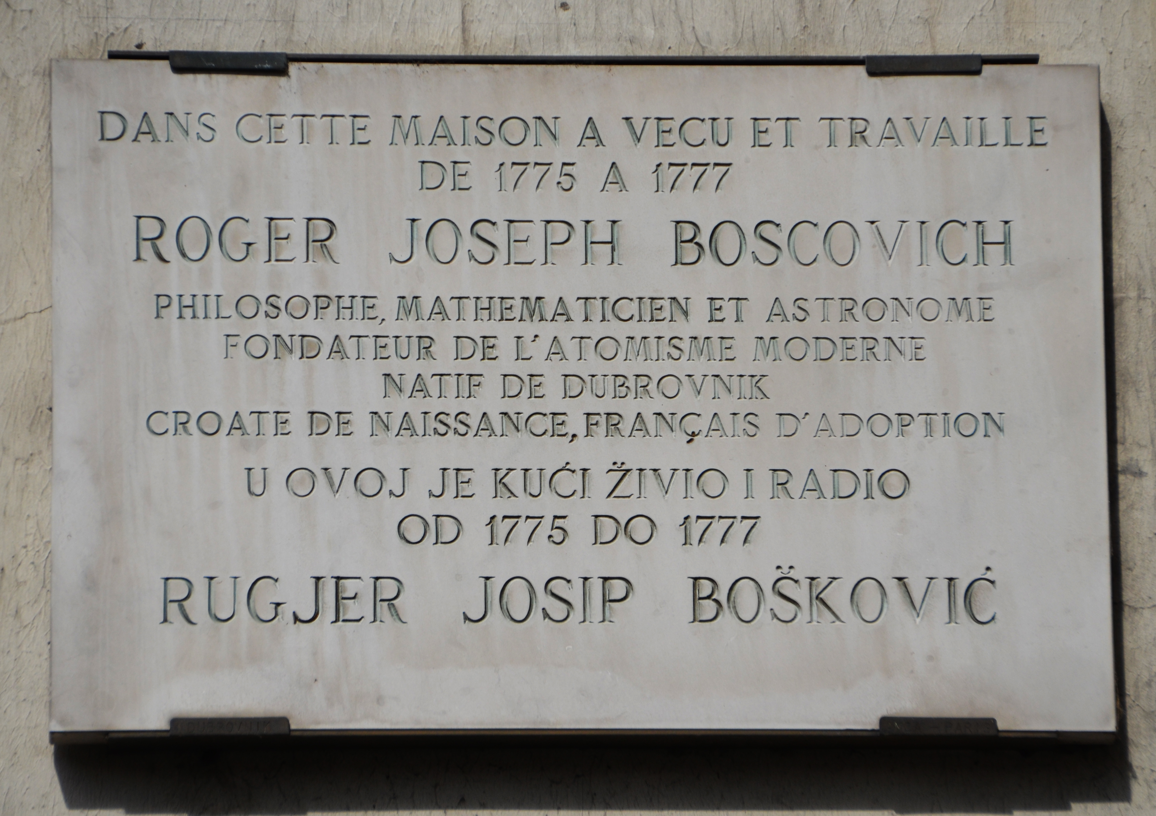 Roger Joseph Boscovich plaque - 6, rue de Seine, Paris 6